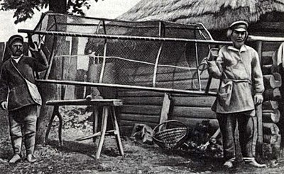 Беларуская (тарашкевіца): Кломля – традыцыйная рыбалоўная прылада ў выглядзе трохграннай прызмы, абцягнутай сеткай (апрача адной бакавой грані). Лякальная назва – баўтуха. Рабілі яе на драўляным каркасе (была і з прутоў). Рыбу лавілі ўдваіх уброд: тапілі кломлю ў вадзе, а затым, падцягваючы яе да берага і боўтаючы нагамі, заганялі рыбу ў пастку. Рыбная лоўля кломляй была пашырана на Палесьсі, сустракалася на Гарадзеншчыне.